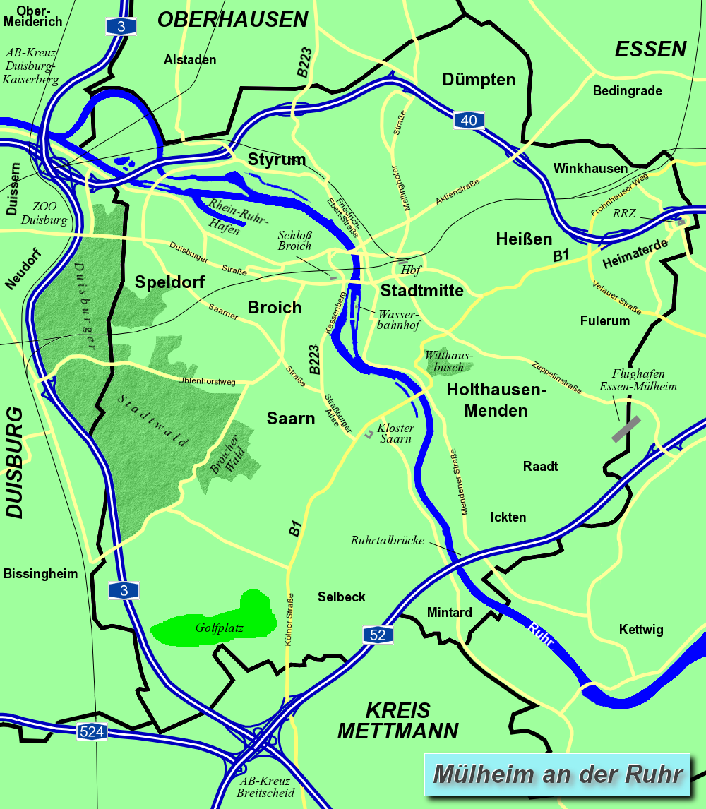 Beschreibung: Mülheim an der Ruhr: Übersichtsplan Zeichner: Benutzer:W.wolny Quelle: 2005-04-18 19:04:33 . . W.wolny (Diskussion) . . 1000 x 1146 (502857 Byte) (kl. korr.) 2005-04-06 14:32:06 . . W.wolny (Diskussion) . . 1000 x 1146 (503414 Byte) (weiter verbesserte Version) 2005-04-05 14:26:35 . . W.wolny (Diskussion) . . 1000 x 1146 (435667 Byte) (verfeinerte Version) 2005-04-03 15:11:30 . . W.wolny (Diskussion) . . 1000 x 1146 (417331 Byte) (Ruhr benannt) 2005-04-03 14:35:44 . . W.wolny (Diskussion) . . 1000 x 1146 (416090 Byte) Lizenz